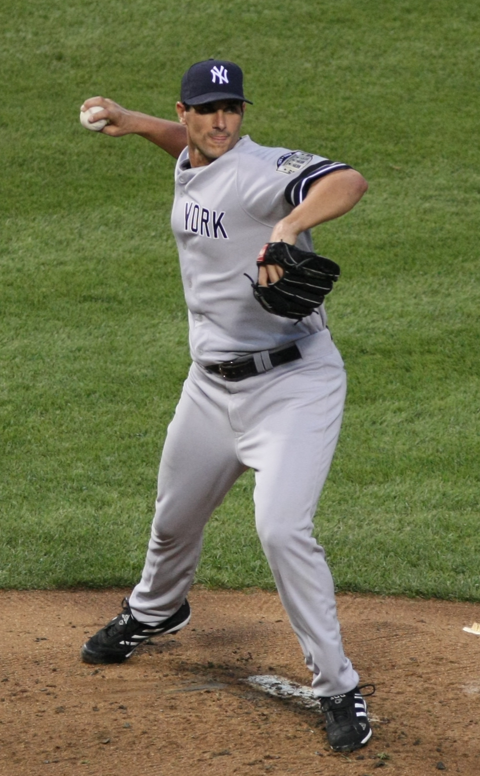 Carl Pavano